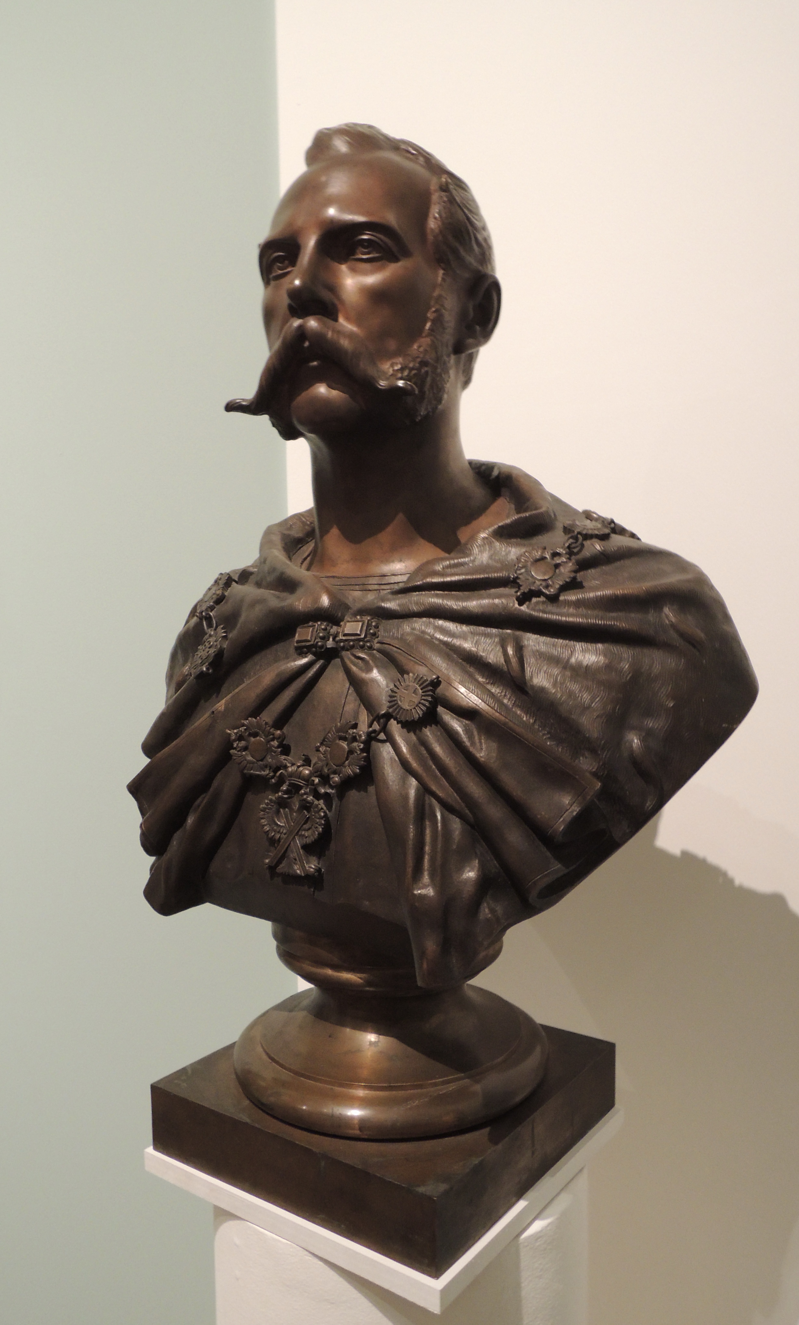 Александр Егорович Тимашев (1818-1893). Портрет императора Александра II. 1882. ГИМ. Бронза. Бюст исполнен по модели скульптора-любителя, крупного гос. деятеля.